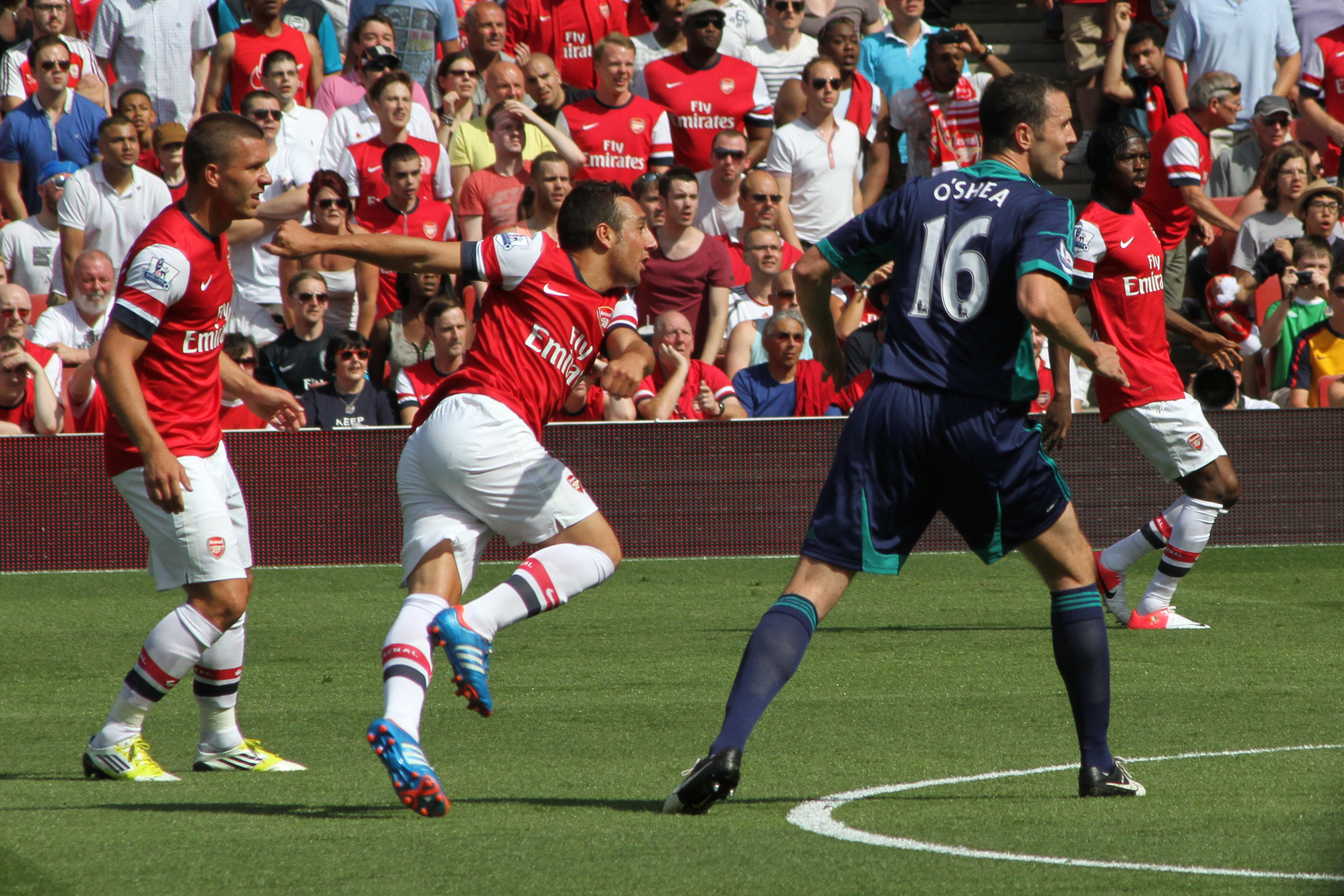 Lukas Podolski, Santi Cazorla, John O'Shea & Gervinho